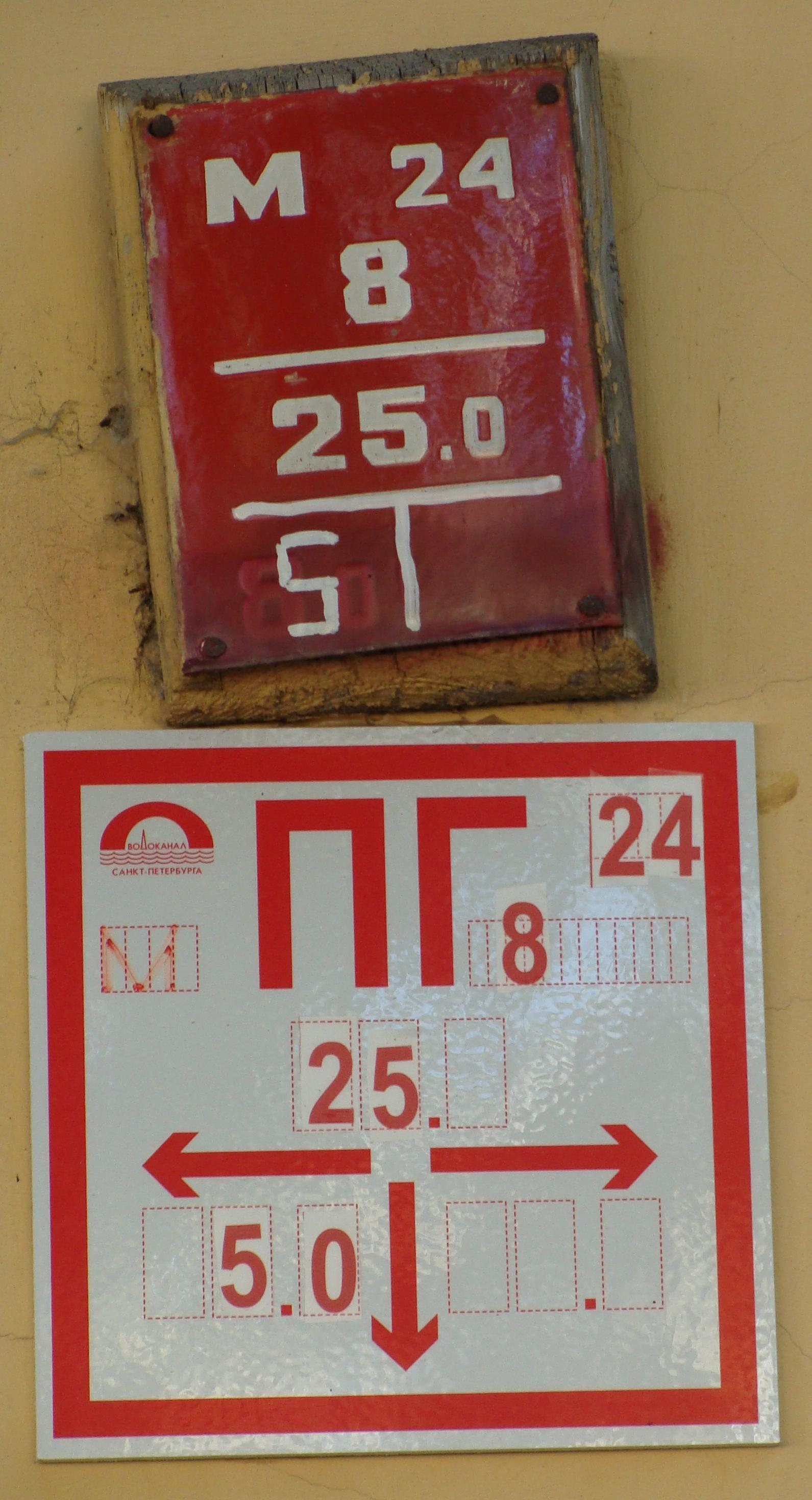 Указатель пожарного гидранта в Санкт-Петербурге